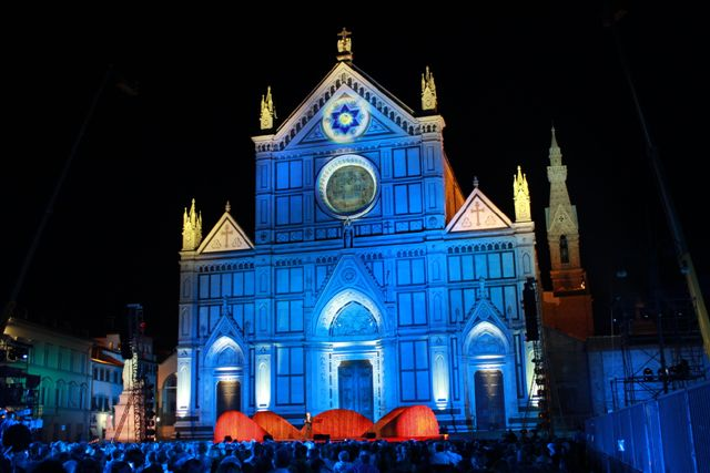 Veduta notturna della facciata di Santa Croce illuminata.